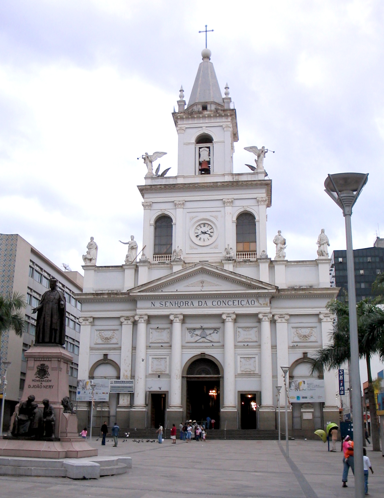 2º lugar - Catedral Metropolitana.